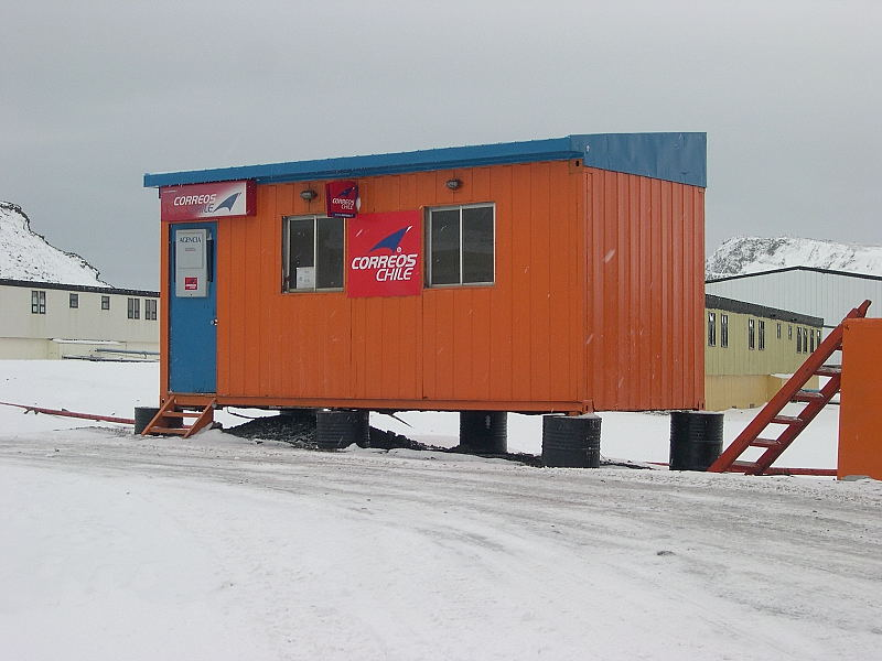 Chilenisches Postamt in der Antarktis